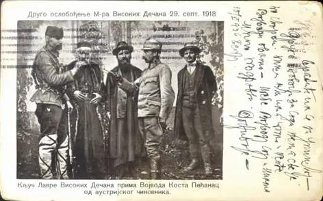 1918, sept. 29. Vojvoda Kosta Pećanac prima kljuc manastira Visoki Dečani od austrijskog cinovnika